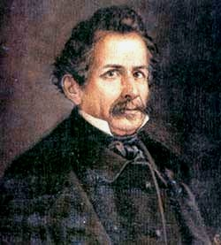 Agustín Codazzi. Oleo de Celestino Martínez